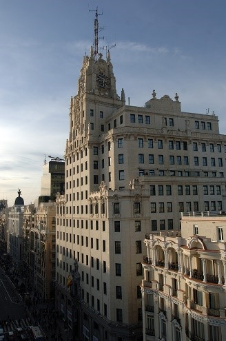 Telefónica sede Gran Vía Madrid